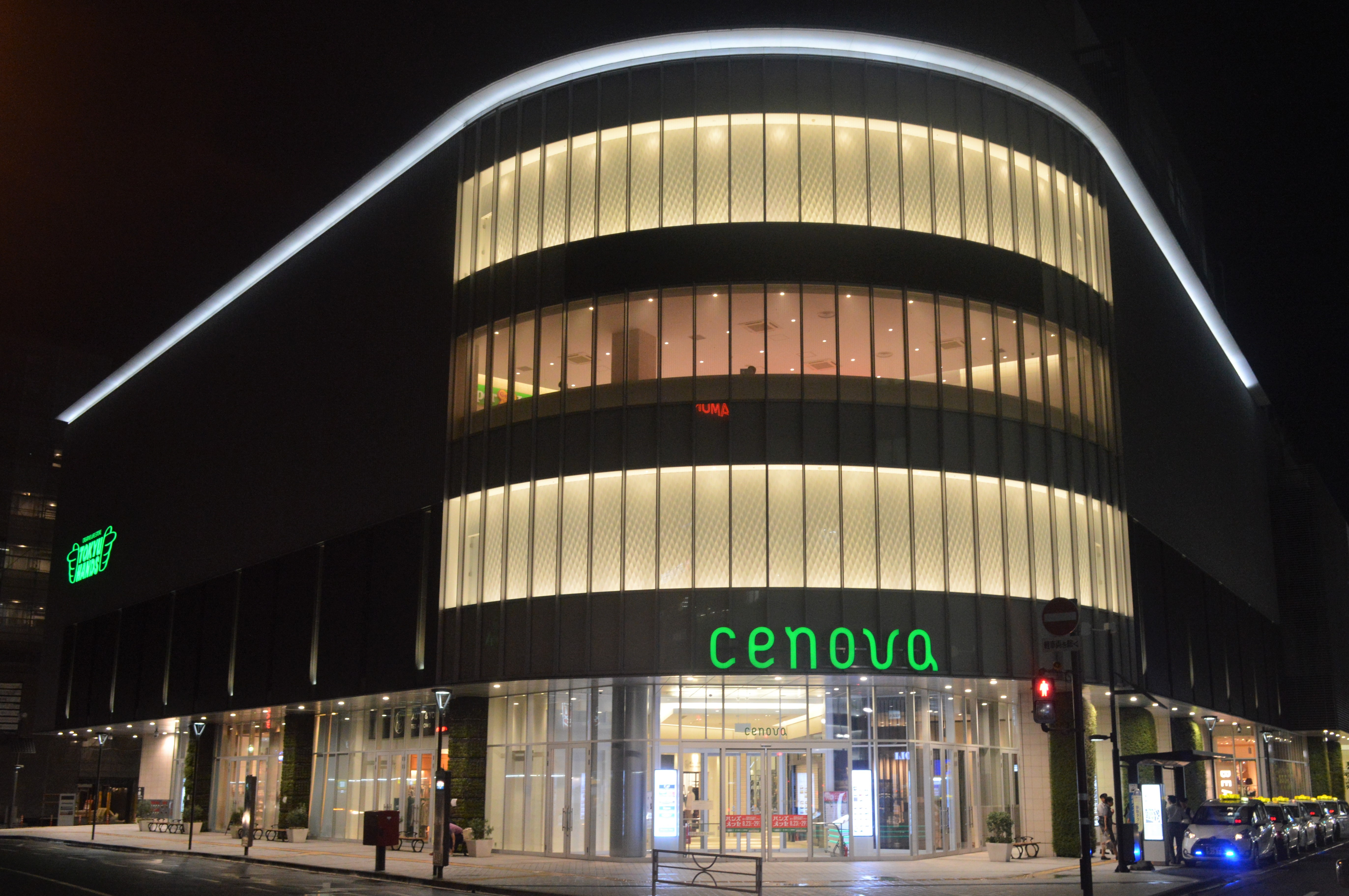 静岡市葵区にある新静岡セノバ。